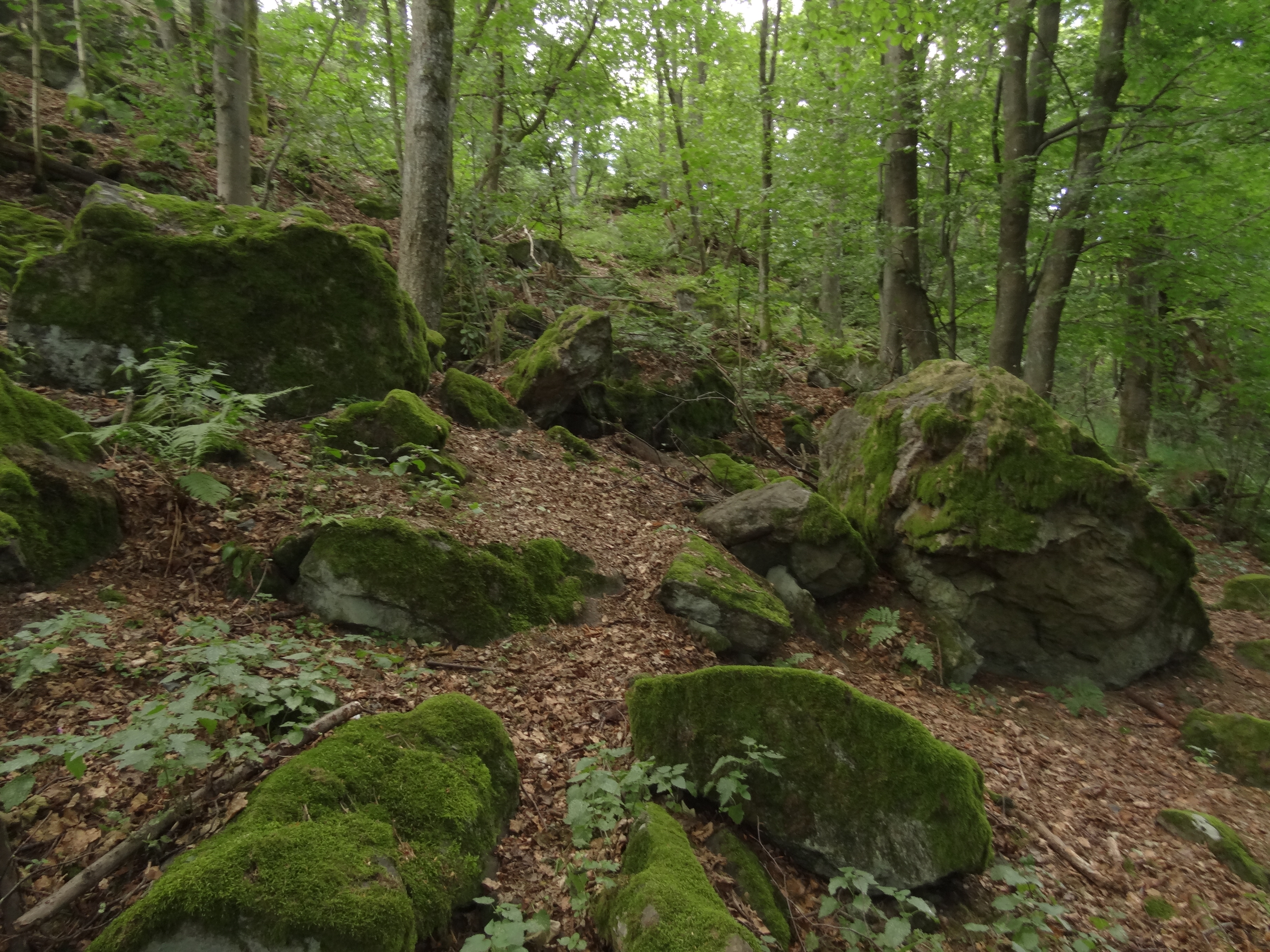 Přírodní rezervace Přimda